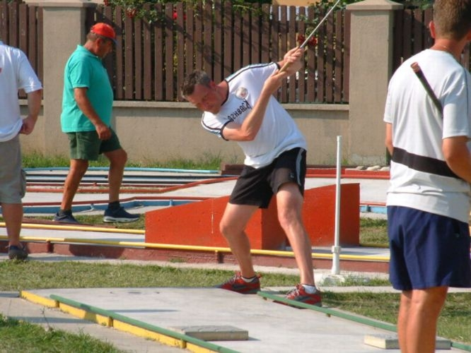 Europameisterschaft Timisoara 2004 (Training)